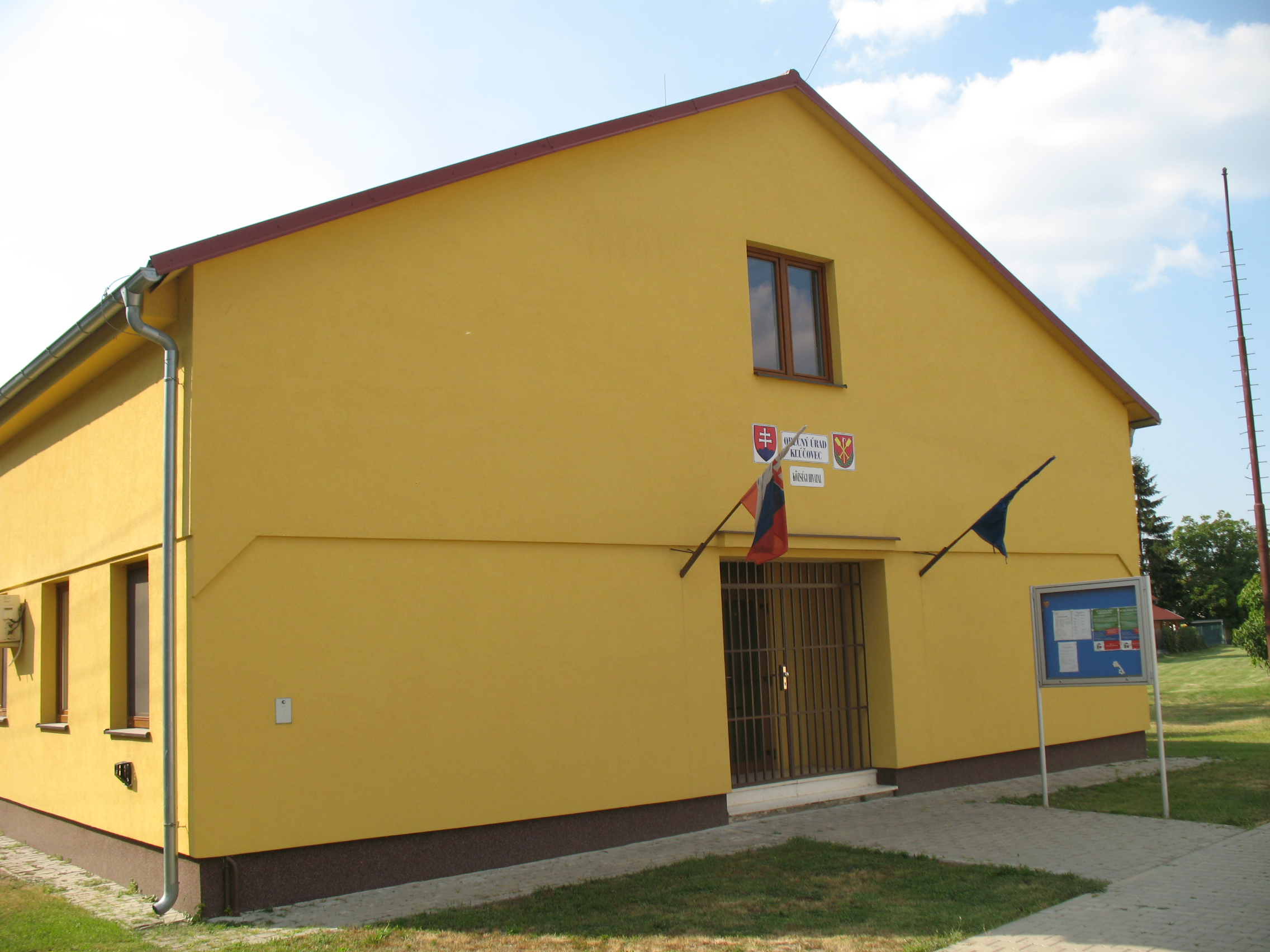 Kulcsod